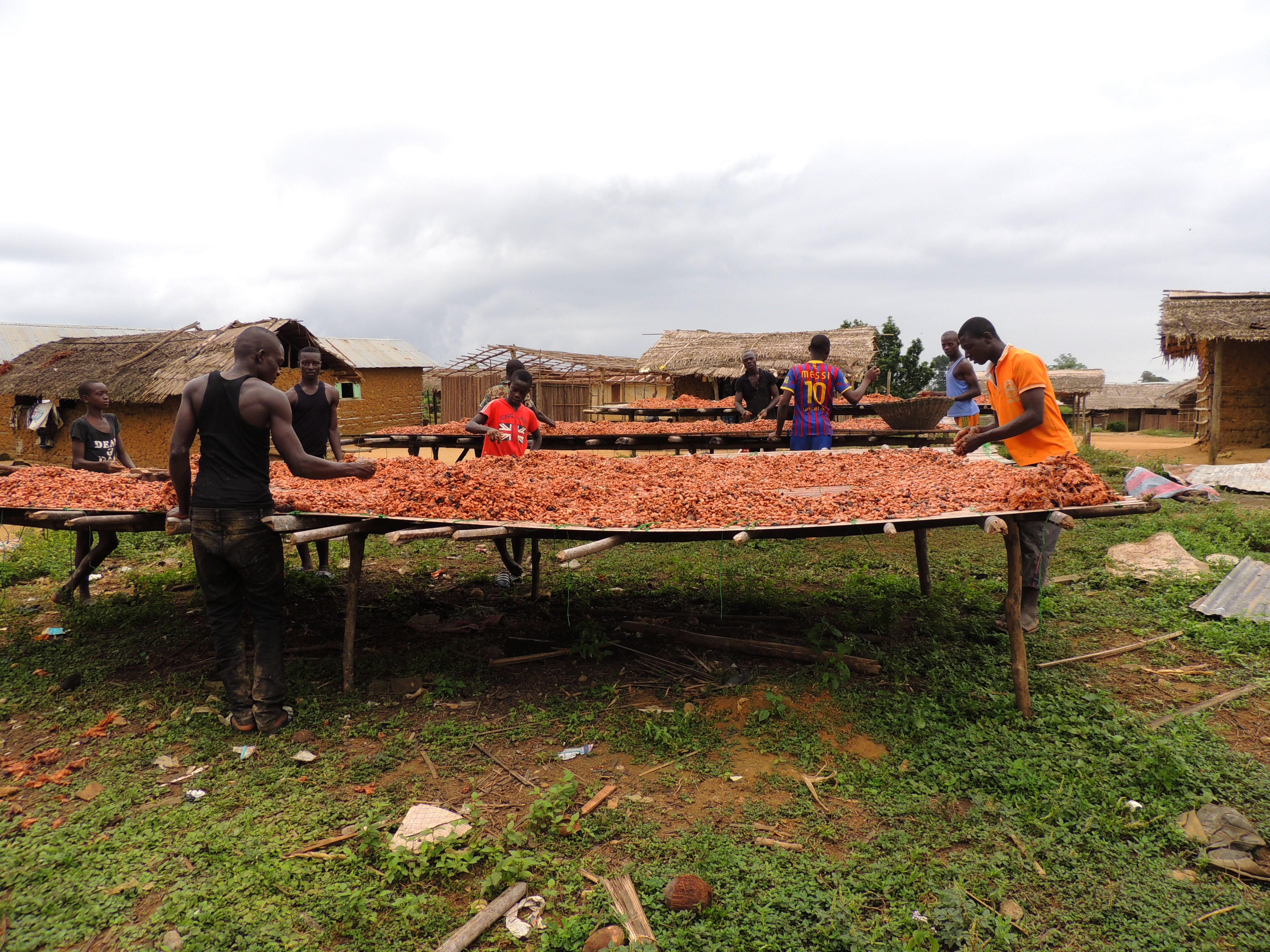 Cultivateurs de cacao ivoiriens en train de nettoyer les fèves et les faire sécher au soleil. This is an image of "African people at work" from Ivory Coast